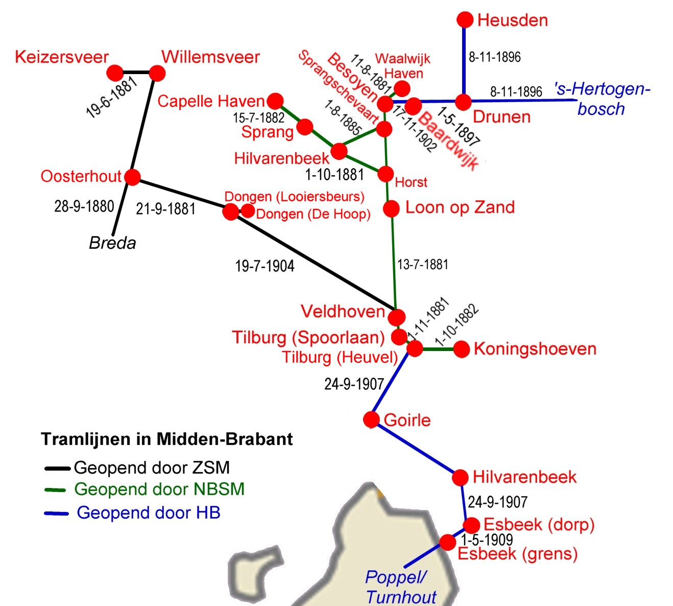 Voormalige tramlijnen in de regio Midden-Brabant, provincie Noord-Brabant, Nederland.